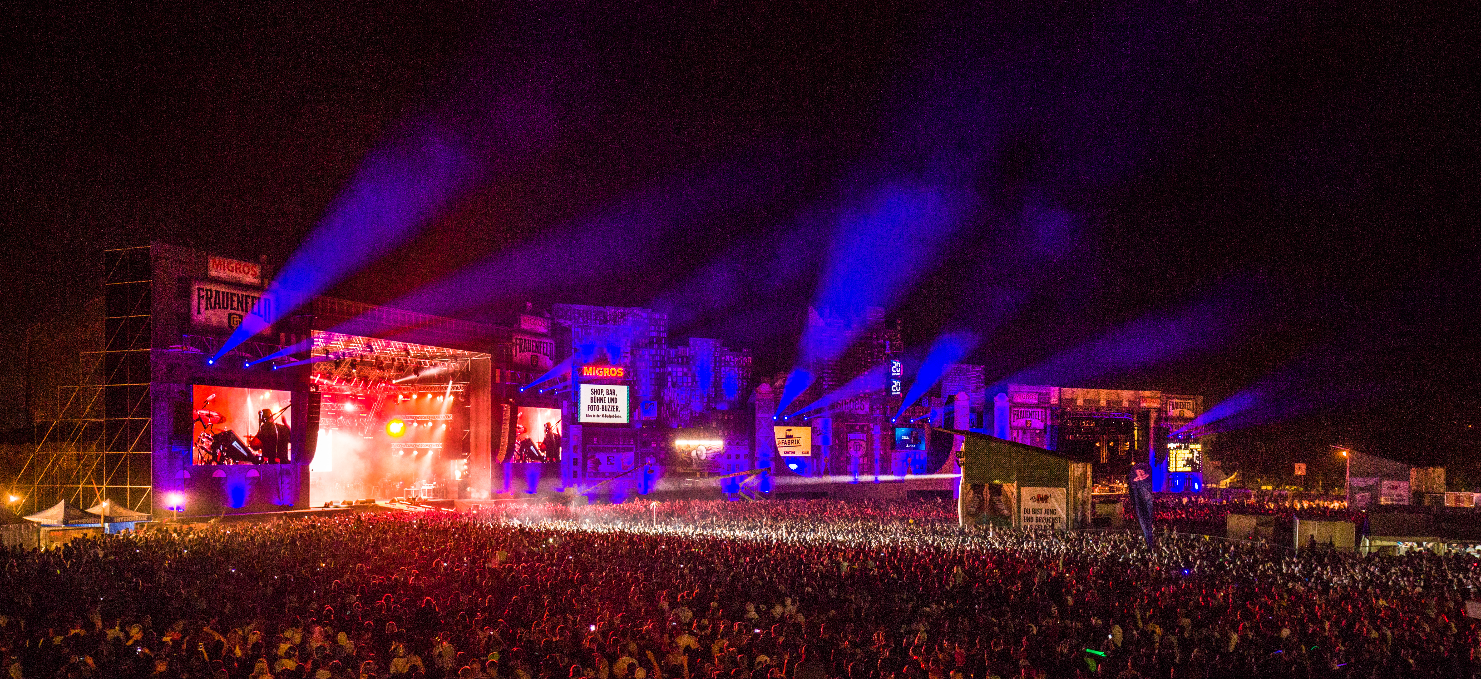 "Skyline"-Stage bei Nacht